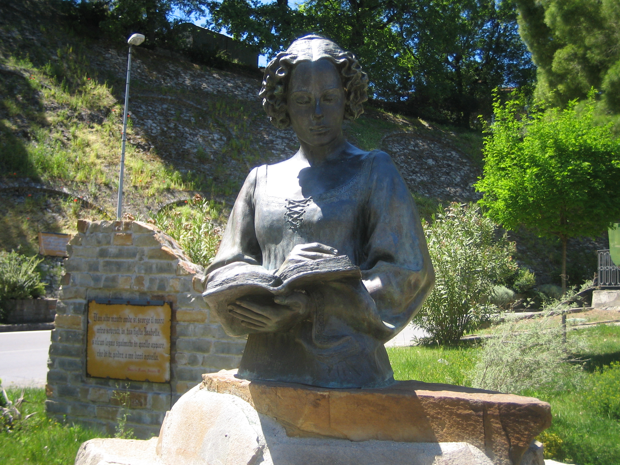 Monumento a Isabella Morra a Valsinni